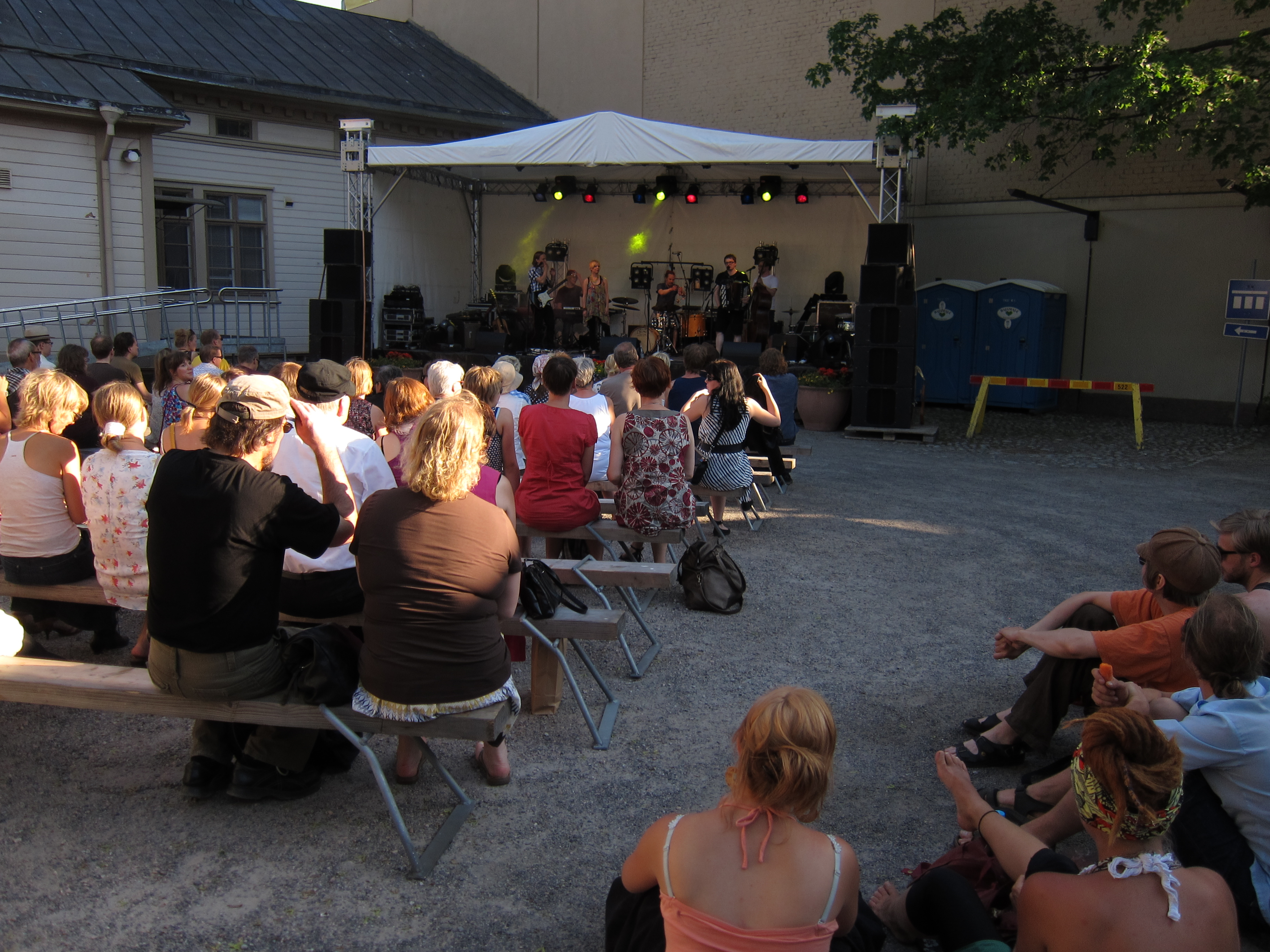 Fortuna korttelin avajaiset 8.6.2011 - yleiskuva lavalla soittavasta Korpi Ensemblesta ja yleisöstä Lisätietoa: [1]